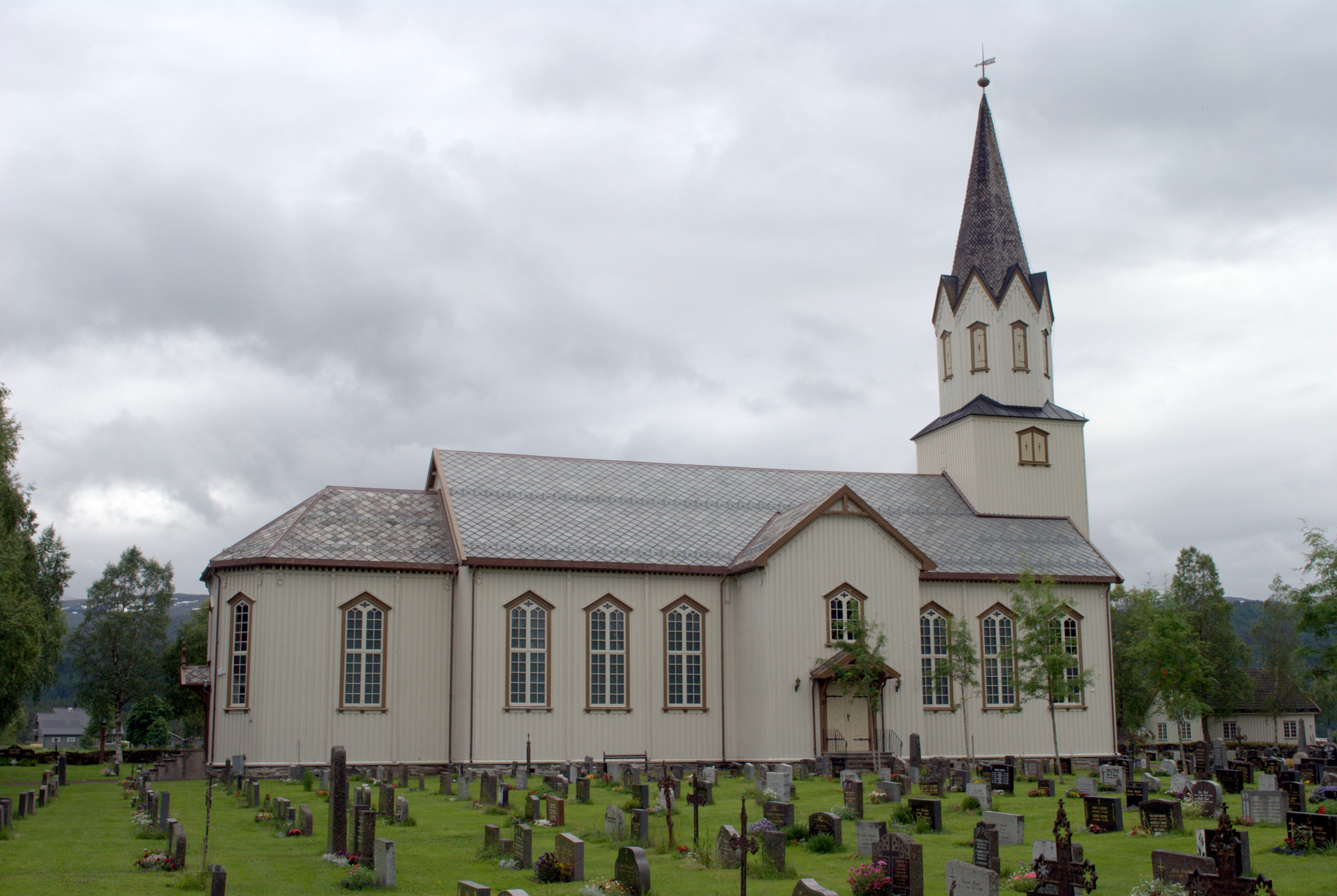 Rindal kirke i Rindal, Møre og Romsdal.